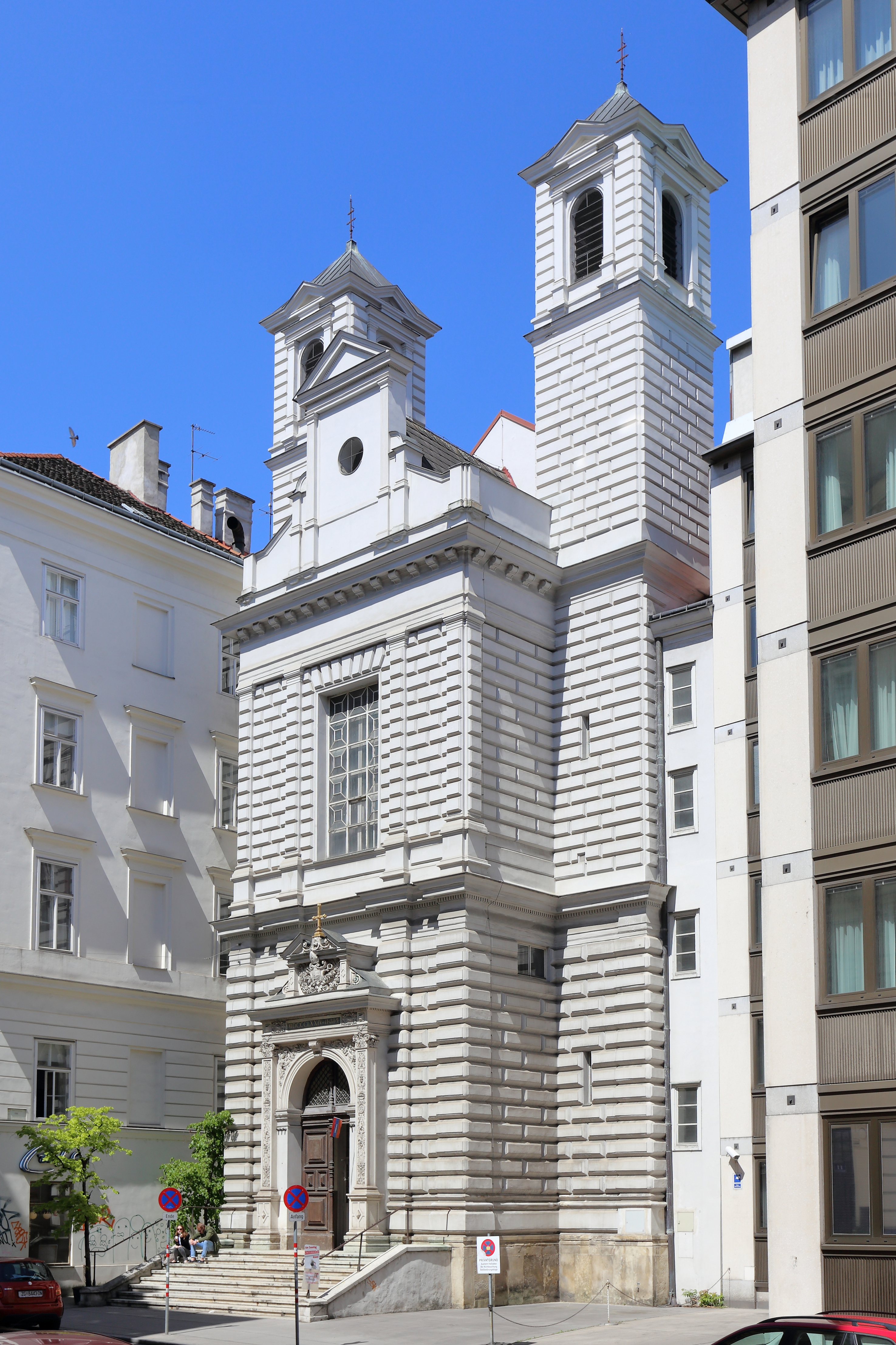 Die Mechitaristenkirche im 7. Wiener Gemeindebezirk Neubau.Ursprünglich war es die Klosterkirche des Kapuzinerklosters "Am Platzl" in der Vorstadt St. Ulrich. Nach Aufhebung des Klosters durch Joseph II. zogen Anfang des 19. Jahrhunderts die Mechitaristen ein. Nach einem Großbrand im Jahr 1835 wurde nach Plänen von Josef Georg Kornhäusel das Kloster zum Teil neu errichtet. Die Kirche selbst wurde von 1871 bis 1873 von Fritz Sitte und seinem Sohn Camillo im Stil der Neurenaissance neu errichtet, nachdem die Vorgängerkirche behördlich wegen Baufälligkeit gesperrt worden war.